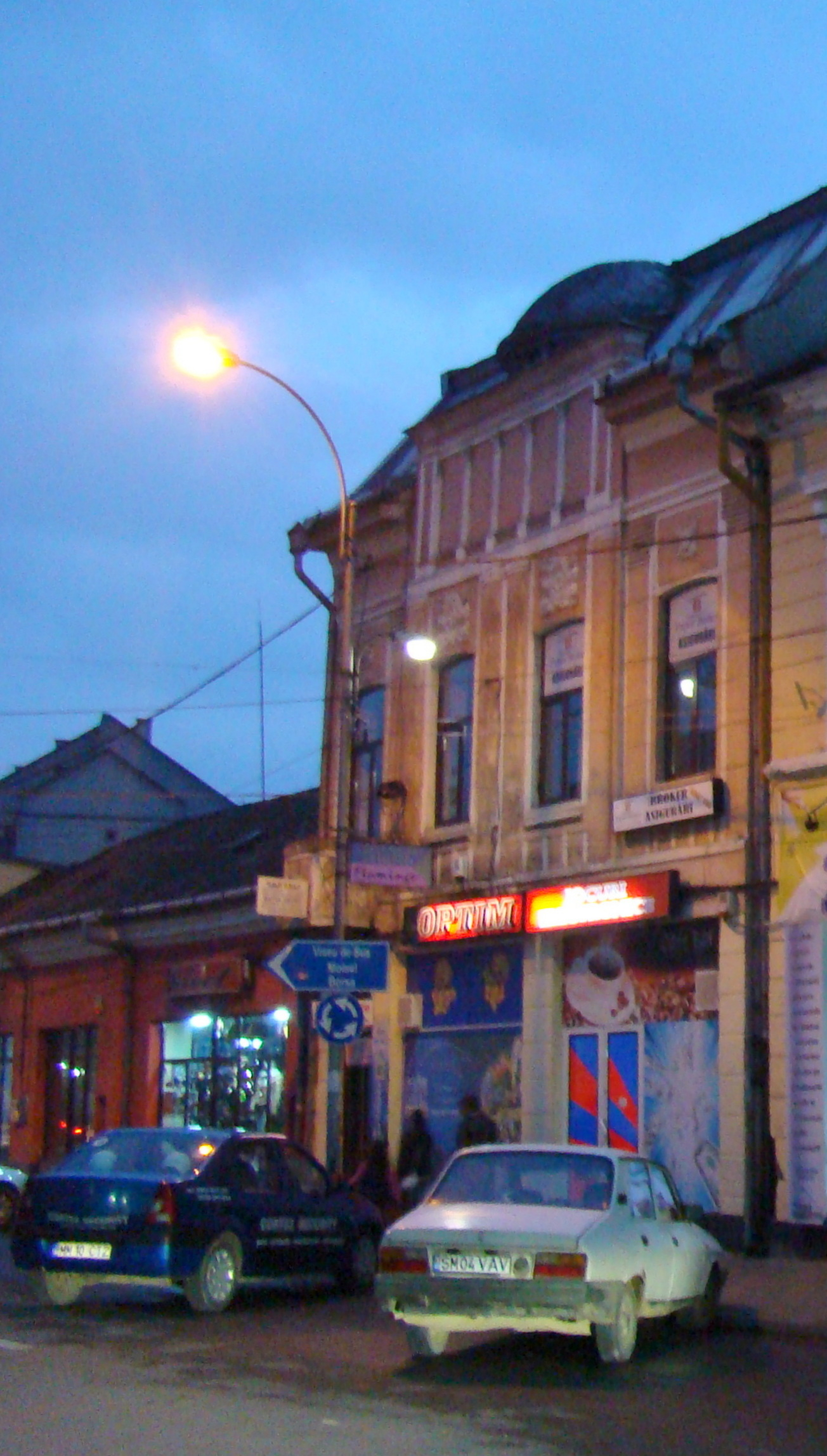 Casă, municipiul Sighetu Marmației, str.Bogdan Vodă 26